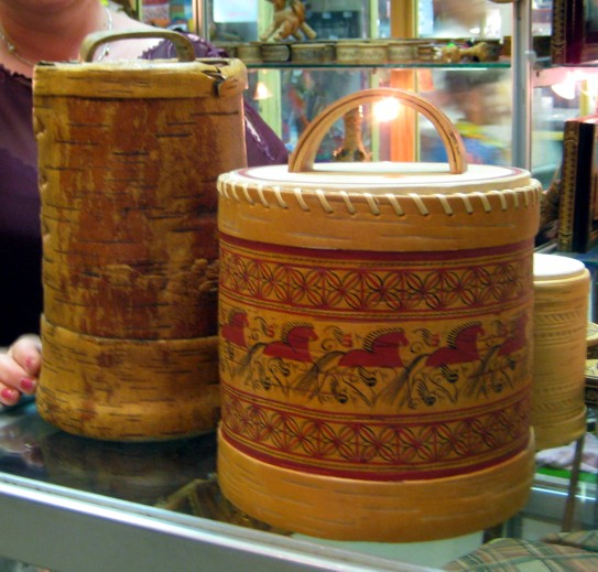 Берестяной туес. Мезенская роспись. Мастер Александр Владимирович Шутихин. (Магазин "Сувениры и подарки из бересты", павильон №1 "Центральный"